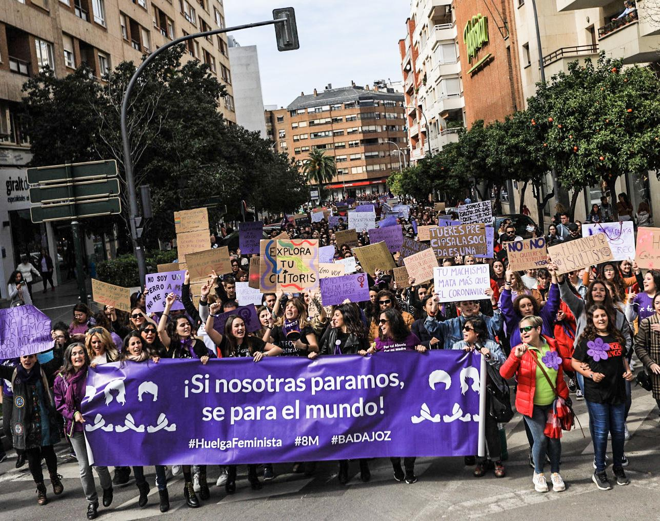 Reivindicaciones 8M